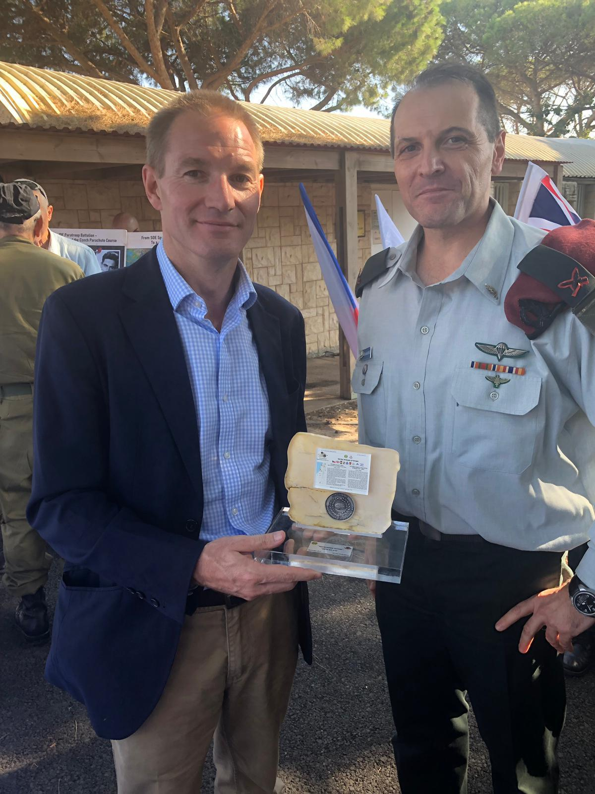 במסגרת פרויקט חץ הדורות - פרויקט המורשת של חטיבת קשרי החוץ של צה"ל. חץ במחנה אחוזה, עם רח"ט קש"ח והשגריר הבריטי בארץ, מר ניל ויגאן.